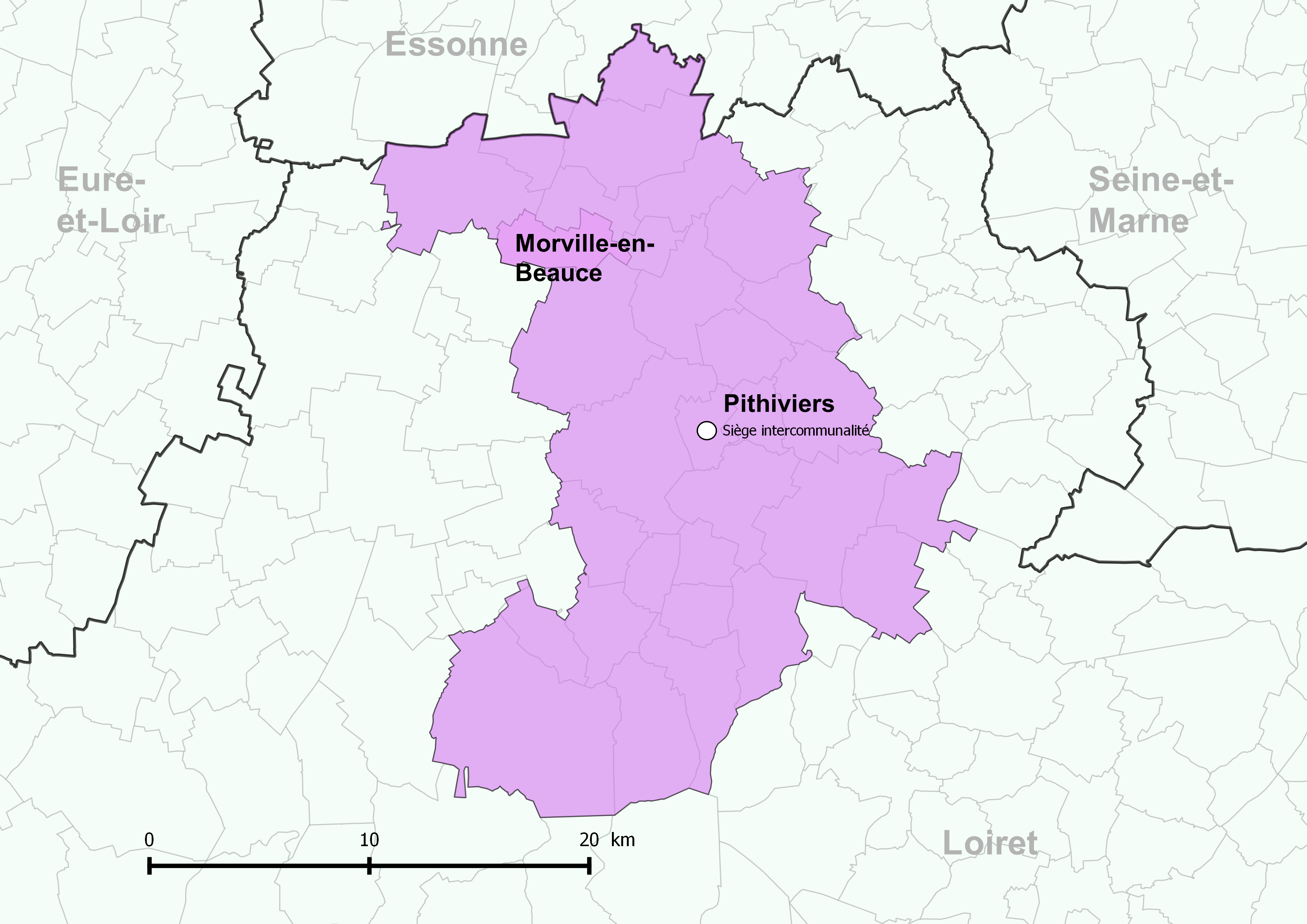 Périmètre de la communauté de communes du Pithiverais - Positionnement de la commune de Morville-en-Beauce.